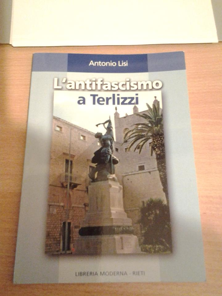 Opera sulle figure simbolo dell'antifascismo terlizzese